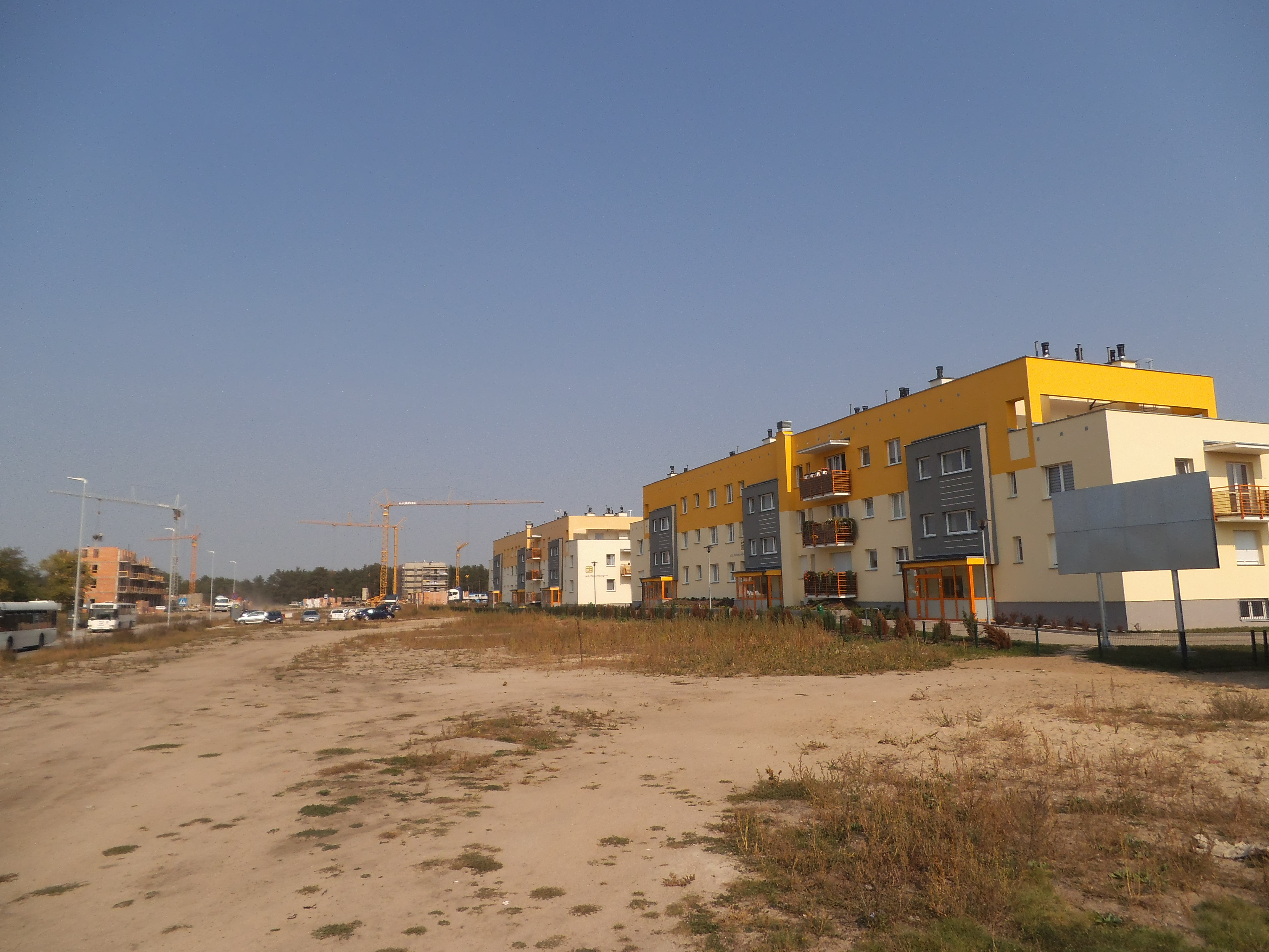 Rozbudowa tzw. osiedla Jar w Toruniu